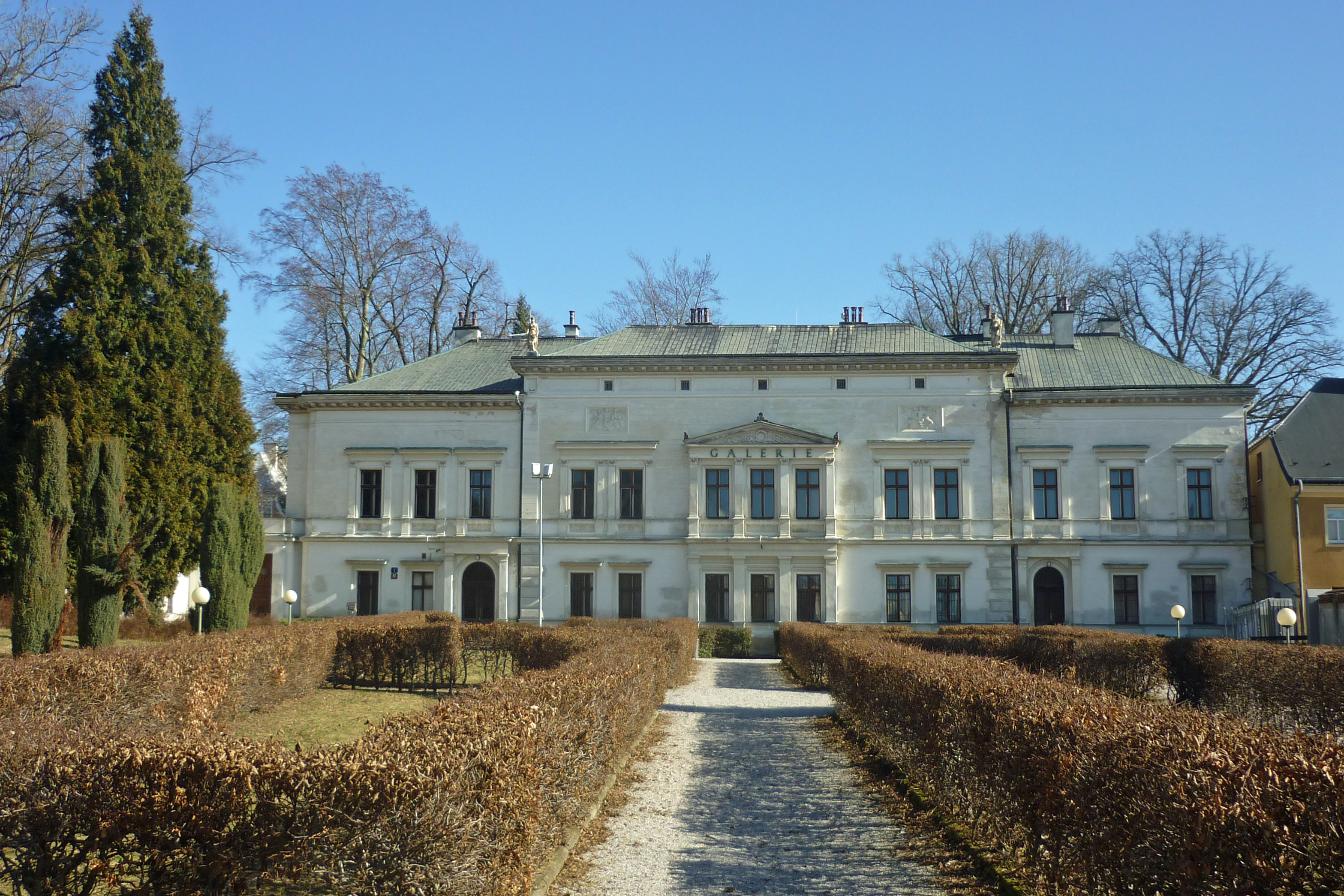 Wohnhaus für Johann Freiherr von Liebieg jun. (1836–1917) in Reichenberg / Liberec, Tschechien, ul. Tiskárny; erbaut 1871–1872 nach Entwurf von Gustav Sachers